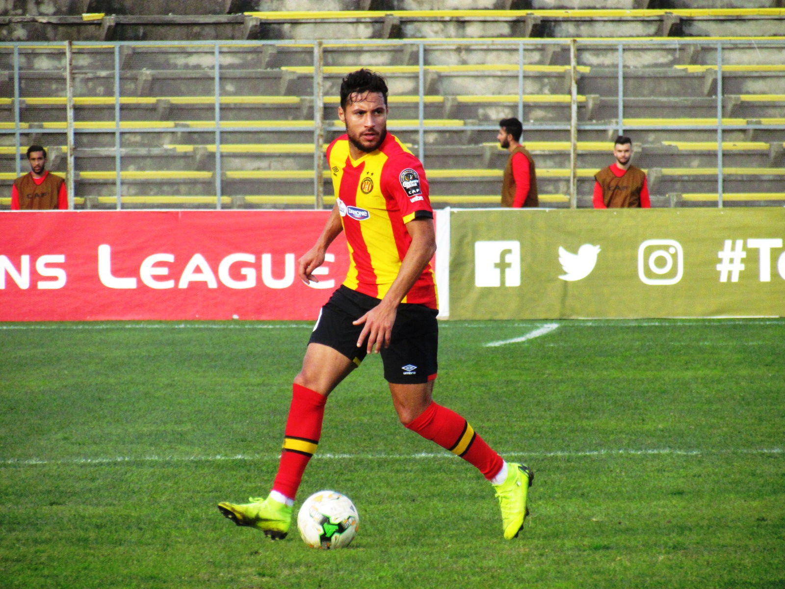 Youcef Belaïli sous les couleurs de l'Espérance sportive de Tunis lors d'une rencontre gagnée en Ligue des Champions de la CAF contre Platinum FC du Zimbabwe (2-0) au stade Olympique d'El Menzah le 18 janvier 2019